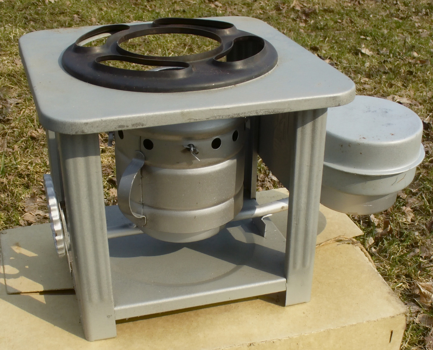 Керогаз. Выпускался Витебским механическим заводом в XX веке.